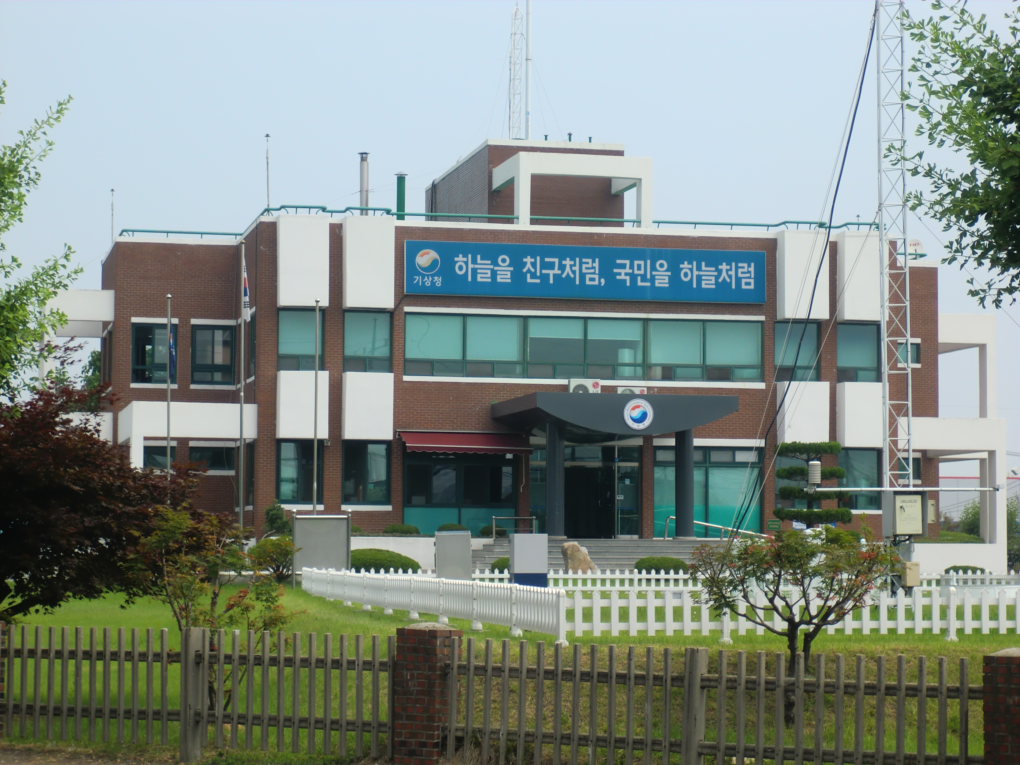 충청북도 청주시에 있는 청주기상대